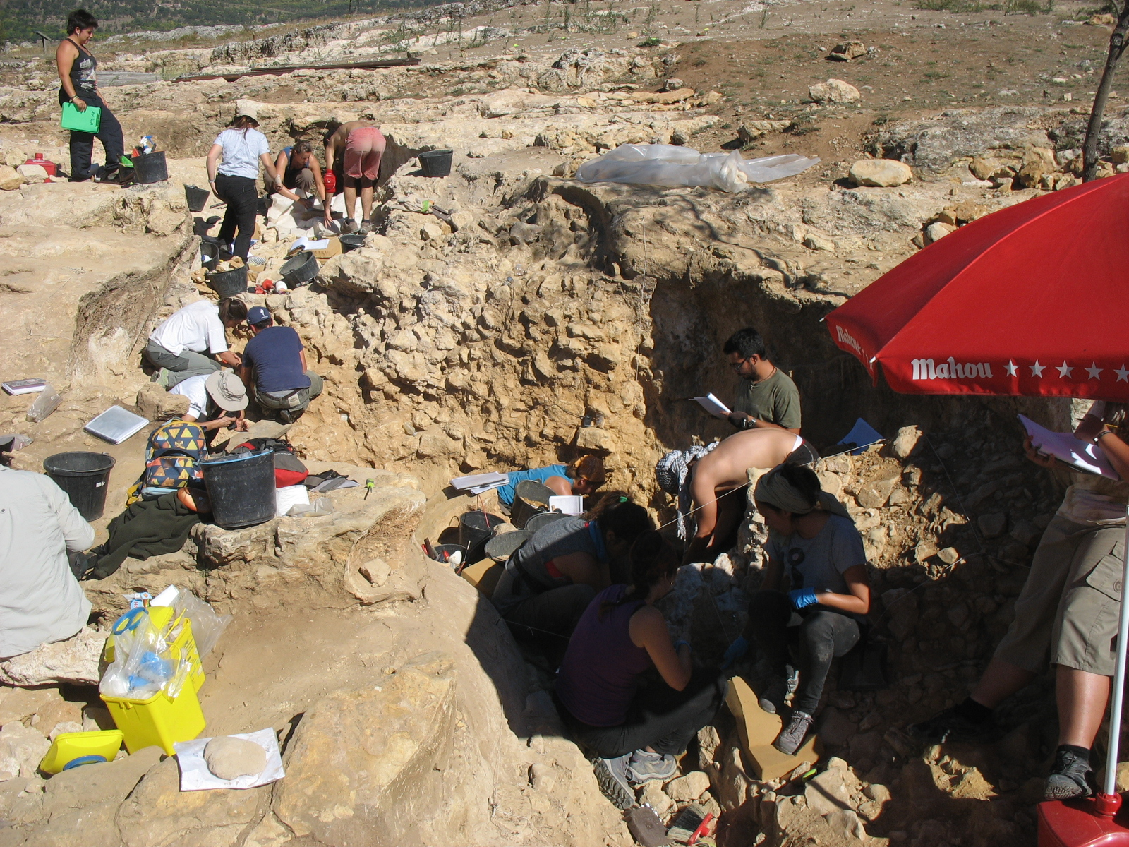 Excavación arqueo-paleontológica en Cueva Des-Cubierta (Calvero de la Higuera, Pinilla del Valle, Madrid, España). Campaña de 2015